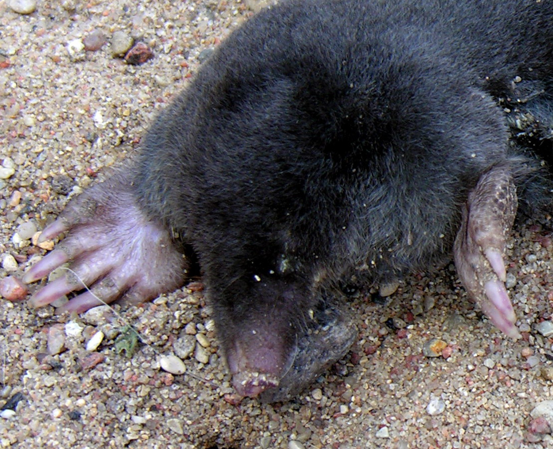 Kurmis (Talpa europaea). Šeima. Kurminiai (Talpidae)